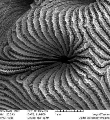 Leptoseris mycetoseroides, vista calicular de coralito con microscopio digital.